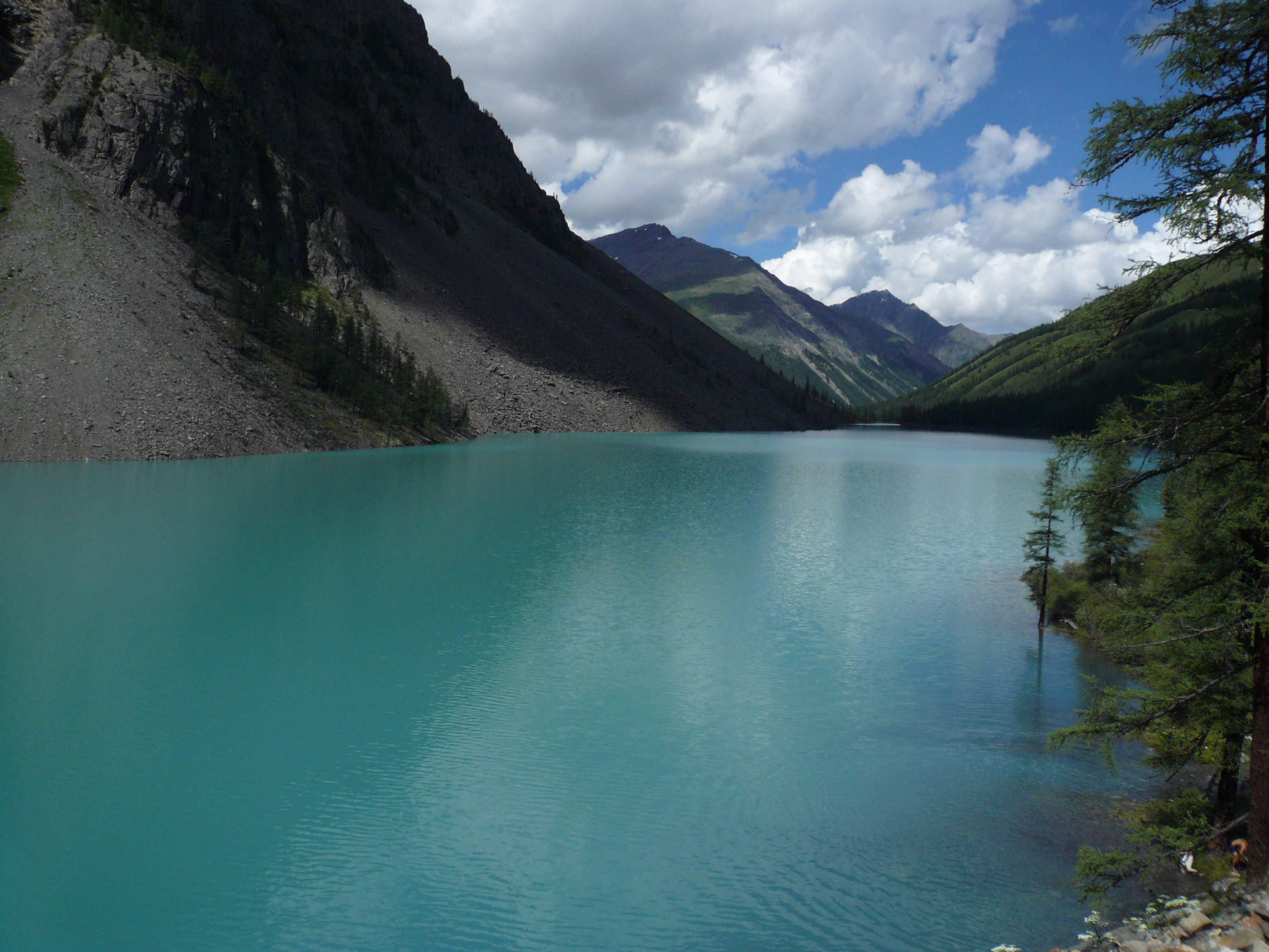 Вид на Нижнее Шавлинское озеро. Высота - 1983 метра.